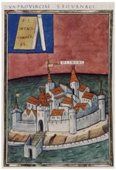 Abbildung aus der Notitia Dignitatum (Oxford (Bodleian Library, Ms. Canon. Misc. lat. 378), entstanden um 1440): Die symbolische Darstellung des Castrum Olinone im Kapitel des Dux Provinciae Sequanicae als Zeichen seiner Zuständigkeit für den Grenzabschnitt am oberen Rheinlimes, Provinz Maxima Sequanorum.